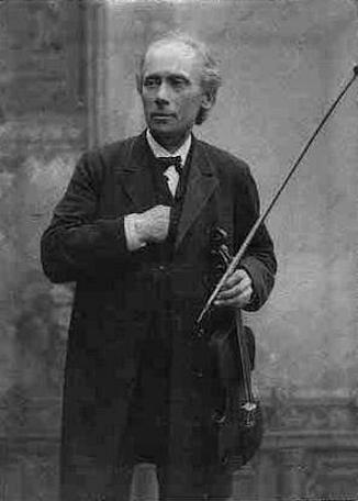 Lars Valdemar Tofte (1832-1907), Danish violinist